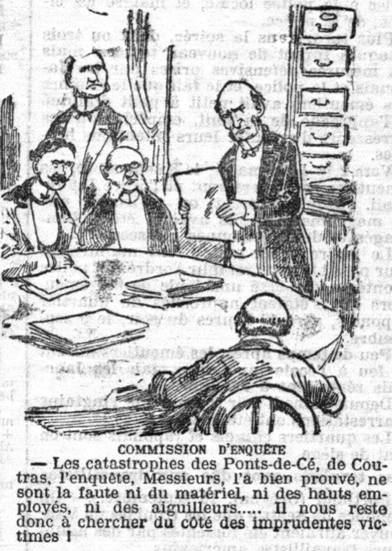 Caricature publiée dans le journal La Croix du 12 septembre 1907 après les catastrophes des Pont-de-Cé et de Coutras.